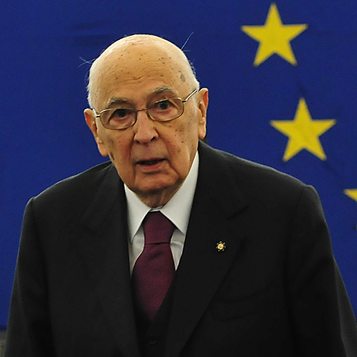 Giorgio Napolitano und Martin Schulz im Europaparlament European Parliament 2014 3.–7. February 2014, StrasbourgThis photo has been created within the project "WIKI loves parliaments / European Parliament". Usage and Help If you have any questions concerning this picture or how to use it, feel free to Personality rights warningAlthough this work is freely licensed or in the public domain, the person(s) shown may have rights that legally restrict certain re-uses unless those depicted consent to such uses. In these cases, a model release or other evidence of consent could protect you from infringement claims.